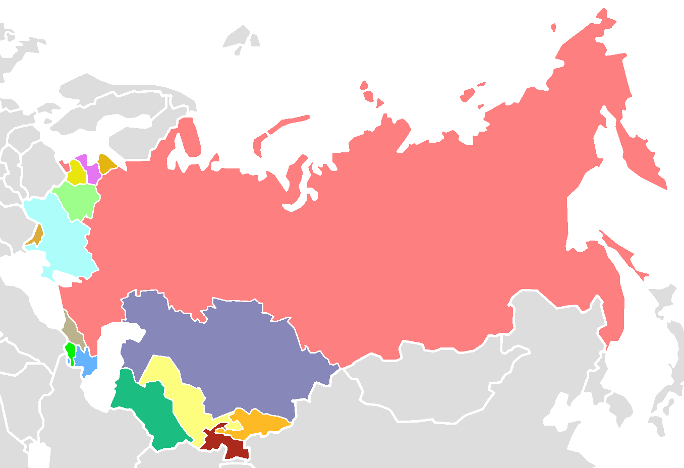 מפת ברית המועצות